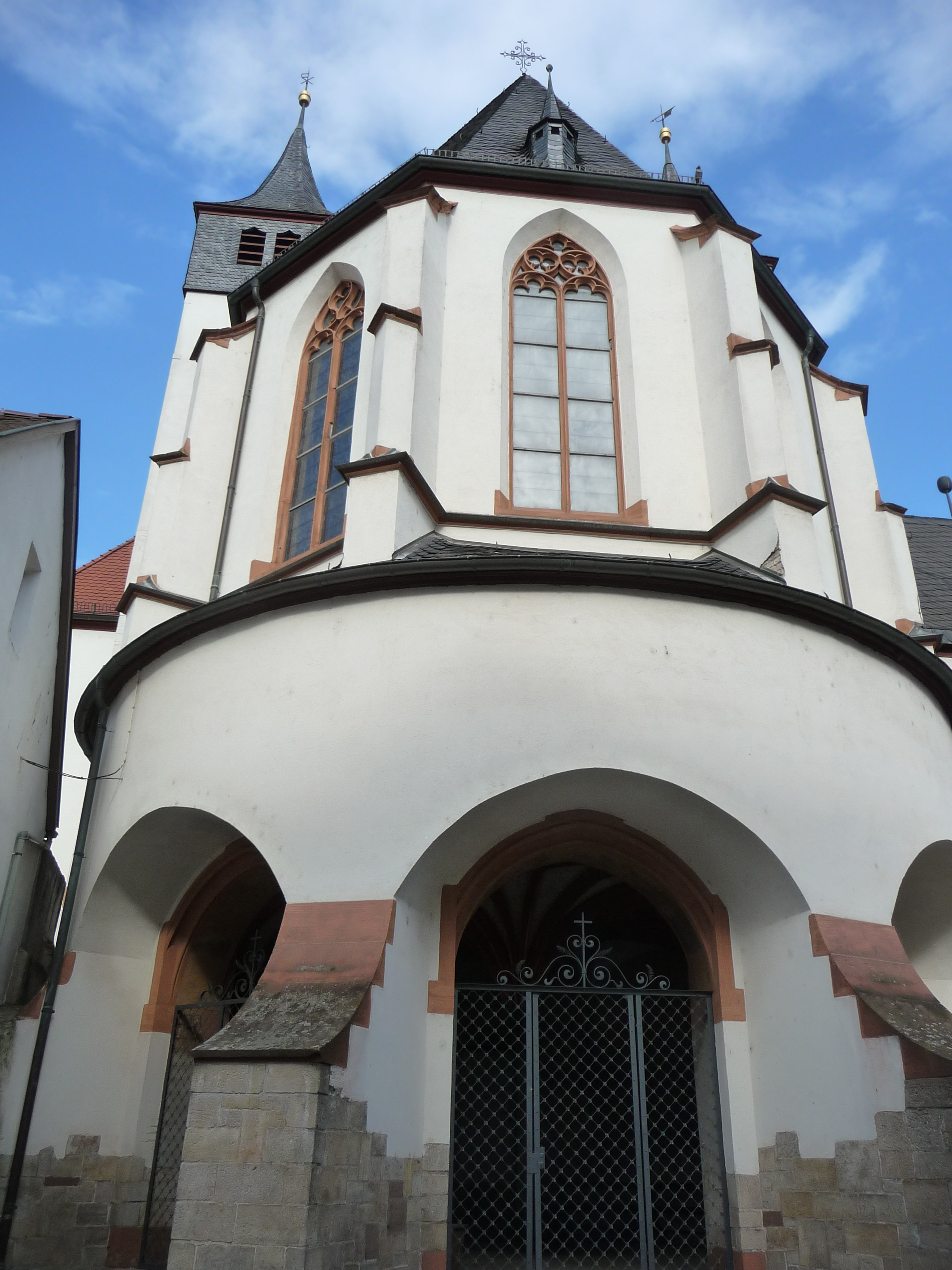 St. Peter (Worms-Herrnsheim)